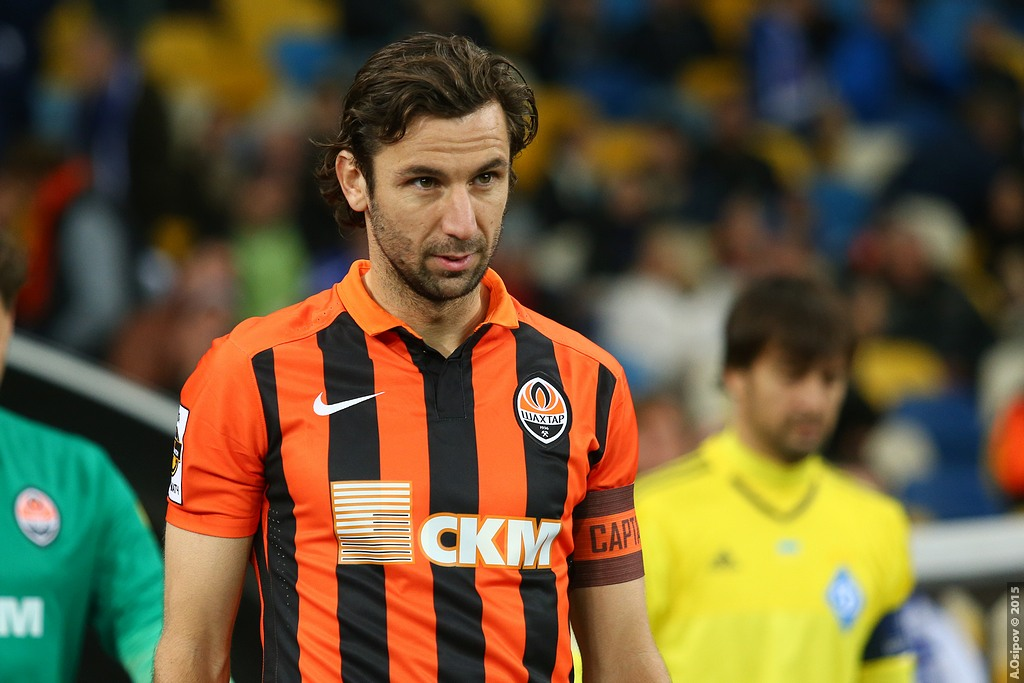 16.10.2015 г.Киев. НСК "Олимпийский". 11-й тур Лиги Пари-Матч. Динамо Киев - Шахтер Донецк - 0:3